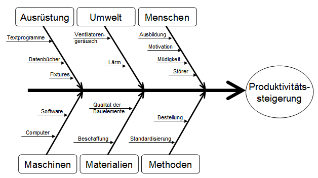 Neugezeichnetes Diagramm nach Vorlage von Benutzer:Aliparvizi, selbsterstellt